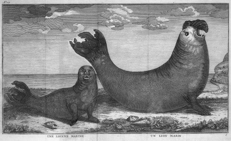 [Illustrations de Voyage autour du monde] Auteur : George Anson Éditeur : Henri-Albert Gosse et Compagnie (Genève) 1750